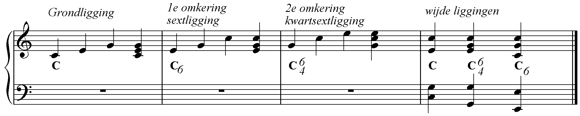 illustratie van omkeringen van een drieklank